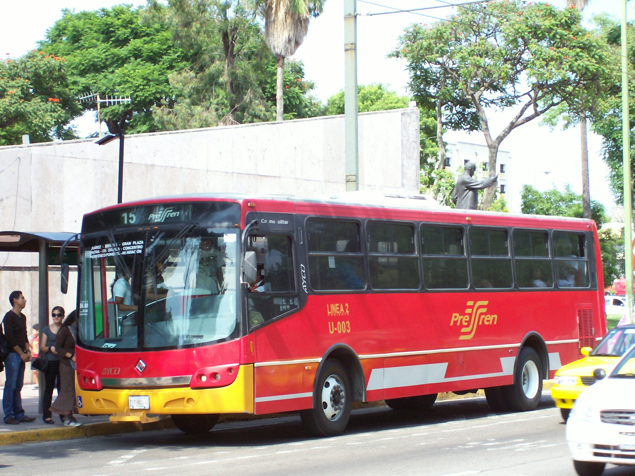 Autobus del tren ligero llamado pre-tren